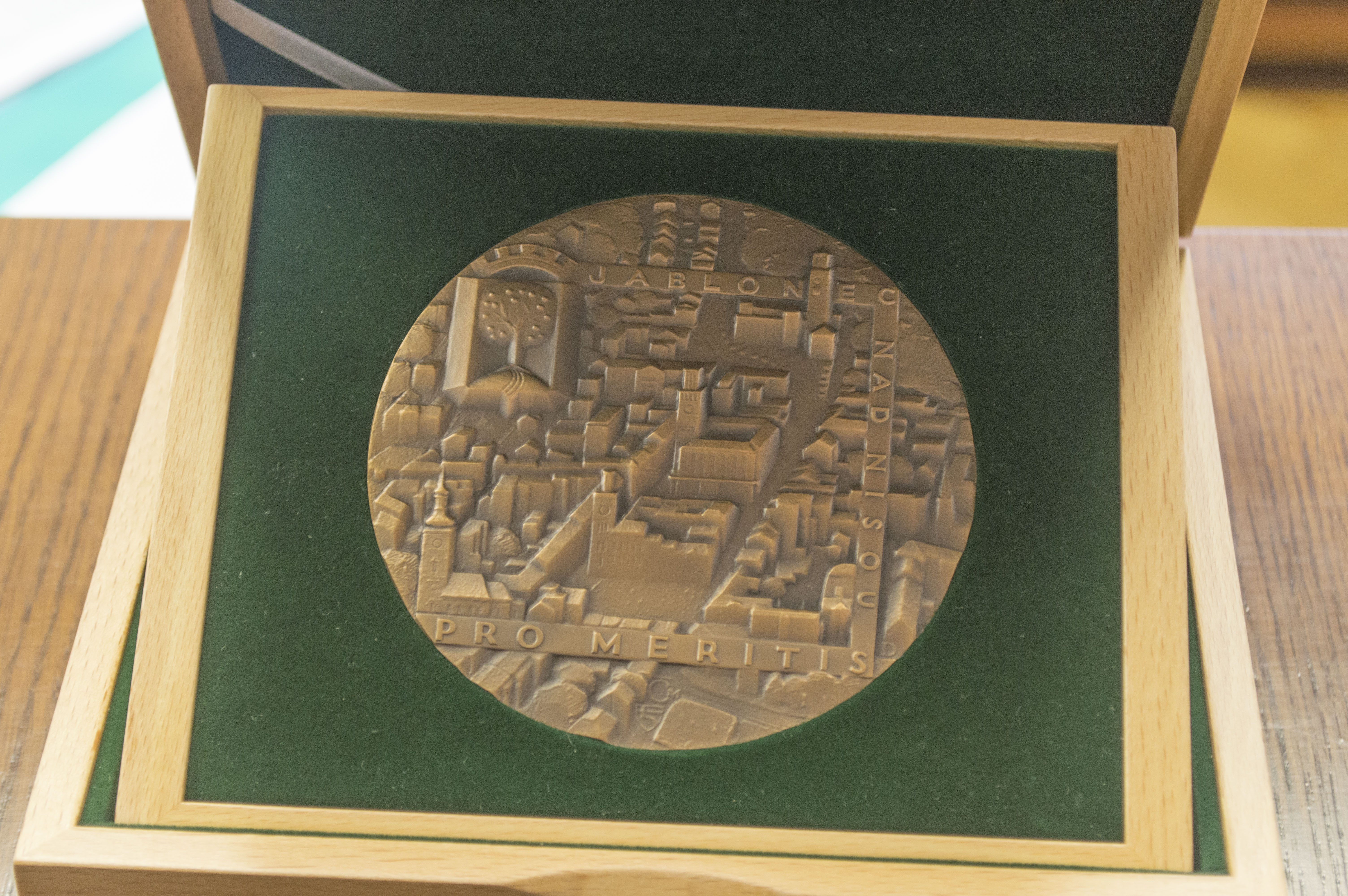 Medaile Pro meritis Jablonce nad Nisou.